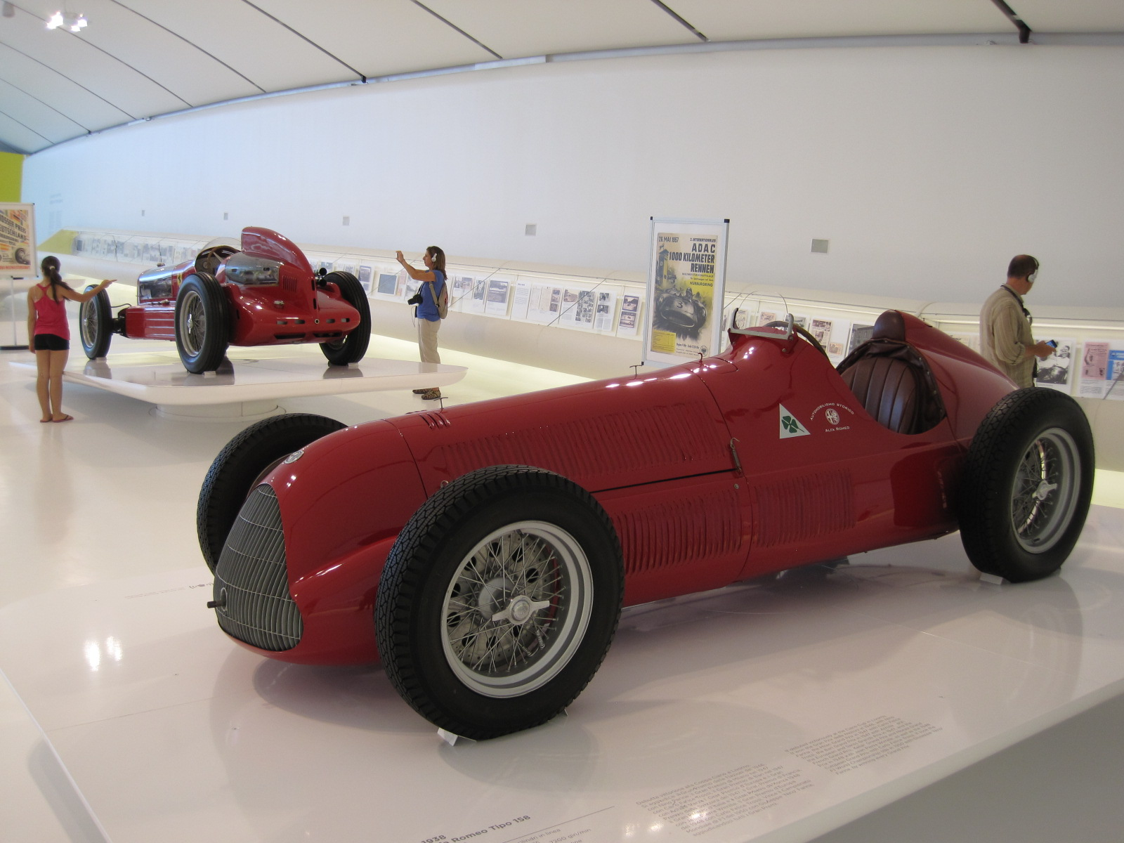 Automobiles in Enzo Ferrari Museum in Modène - Alfa Roméo Type 158 / 1938